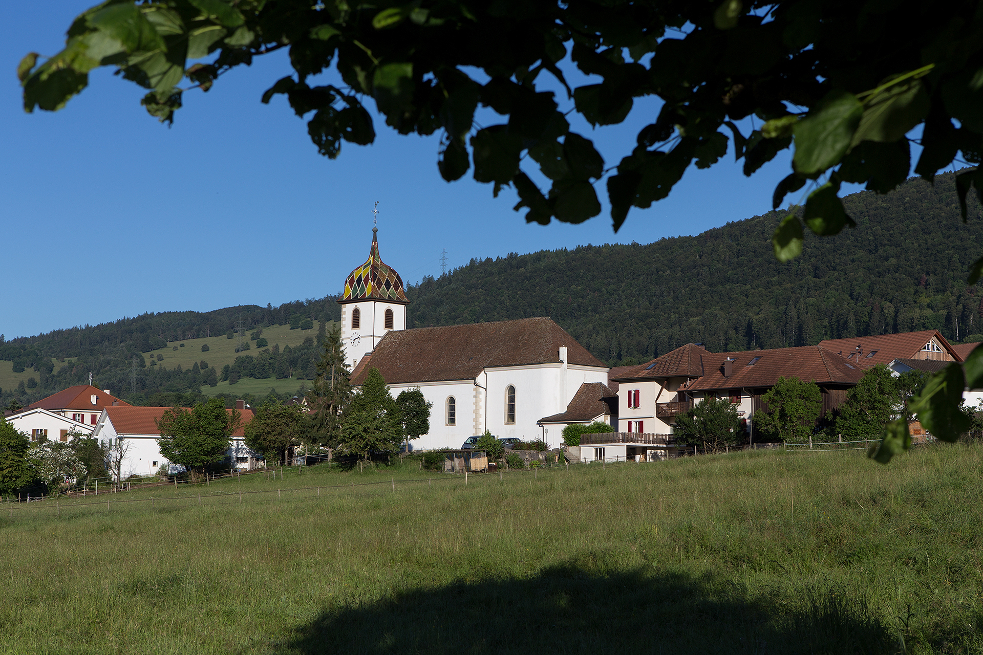 Kirche von Boncourt (JU)